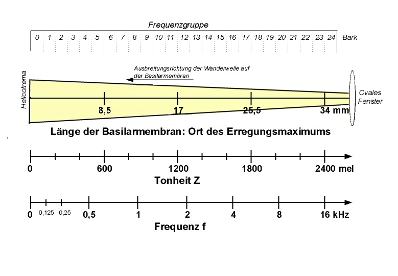 Zusammenhang zwischen Länge der Basilarmembran, Tonheit Z und Frequenz f Ein Ton einer bestimmten Frequenz führt an einem bestimmten Ort der Basilarmembran zu einem Erregungsmaximum der Haarzellen. Dargestellt ist der Ort des Erregungsmaximums und seine Beziehung zur wahrgenommenen Tonhöhe - der Tonheit Z in Mel - und zur Frequenz f des Signals. Die Trapezform des gelben Bereichs schematisiert die entrollte Cochlea, nicht jedoch die Basilarmembran. Die Basilarmembran verbreitert sich vom ovalen Fenster zum Helicotrema hin.